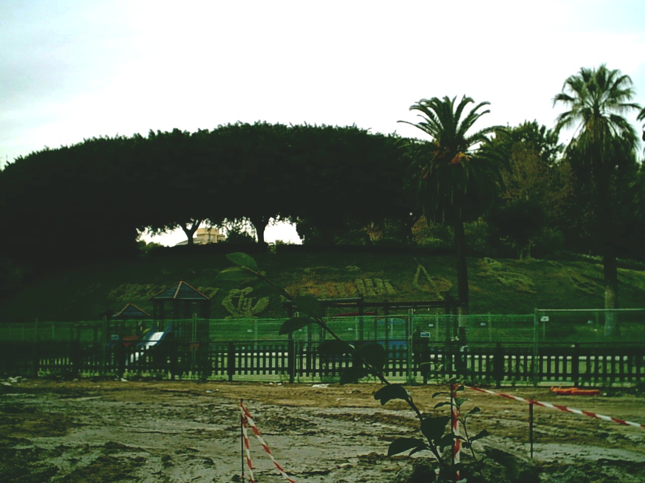 Foto paesaggio